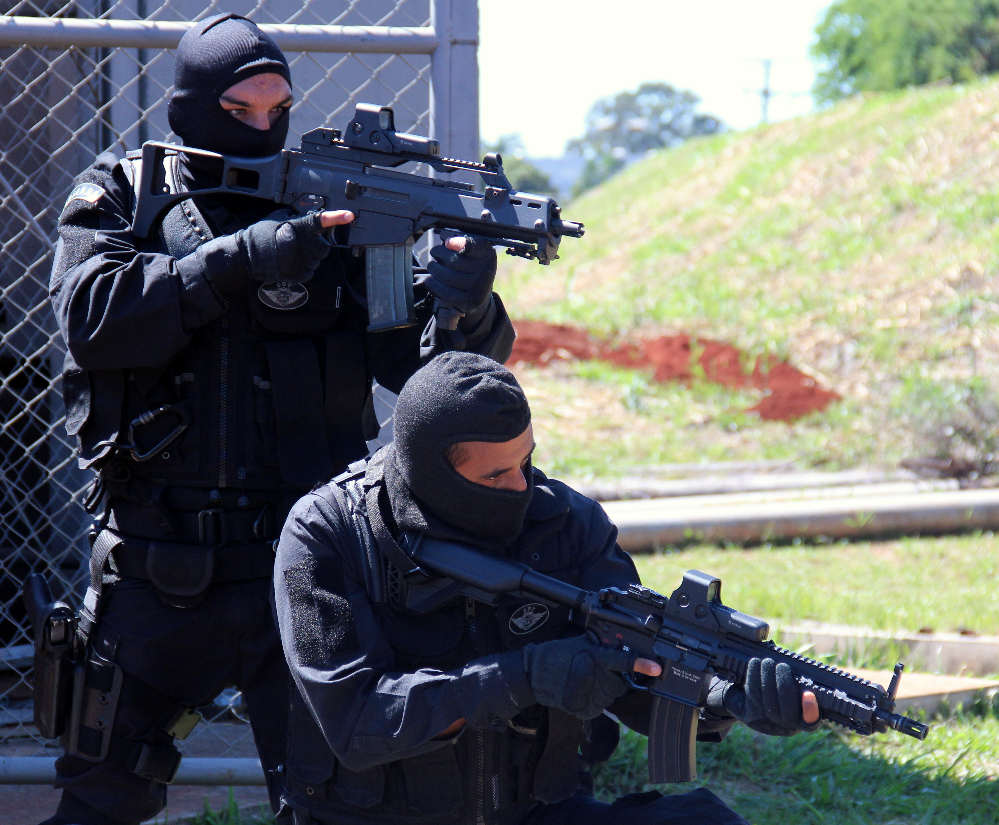 Comando de Operações Táticas Departamento de Polícia Federal